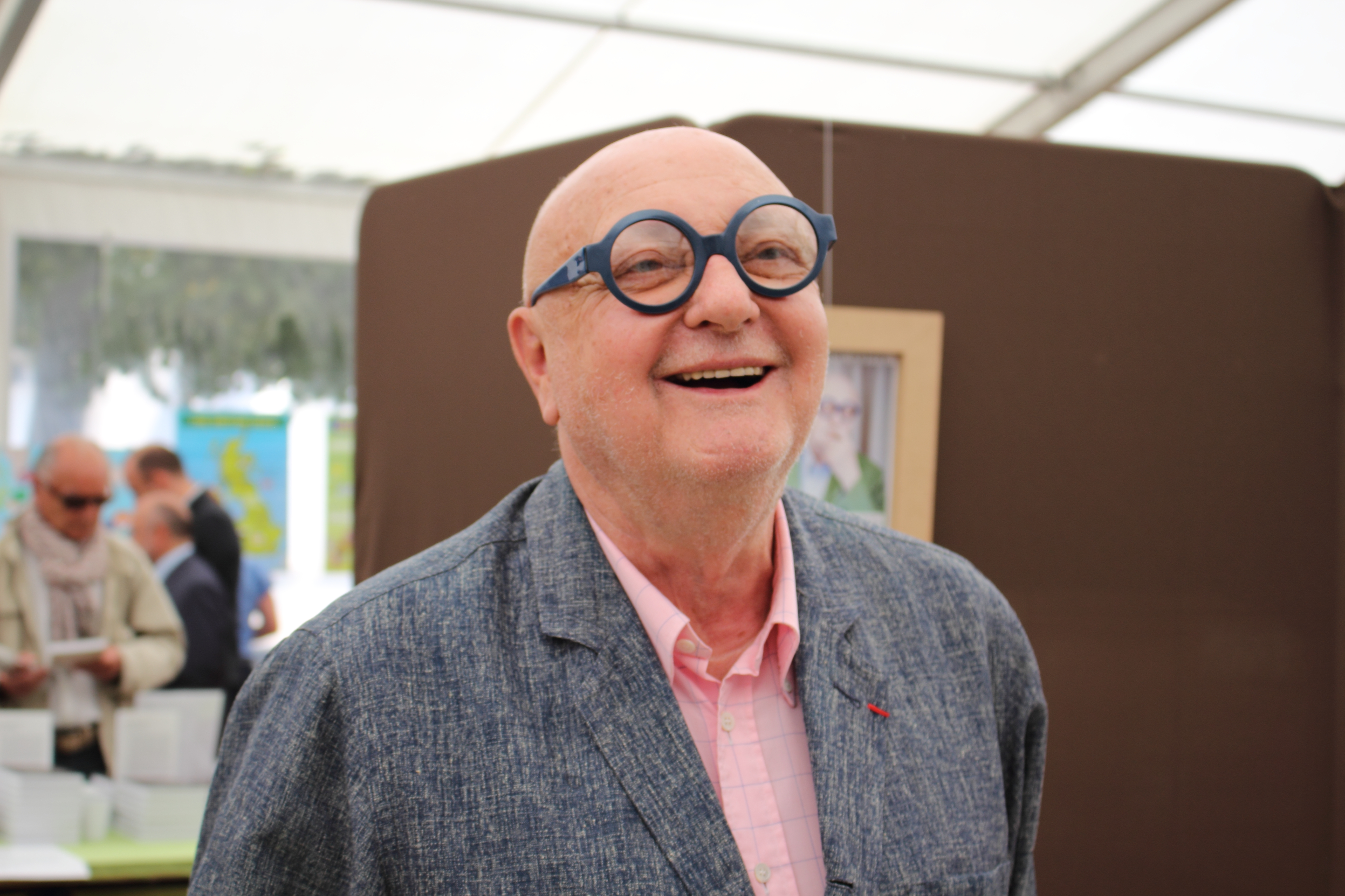 Jean-Pierre Coffe - Le Livre sur la Place à Nancy